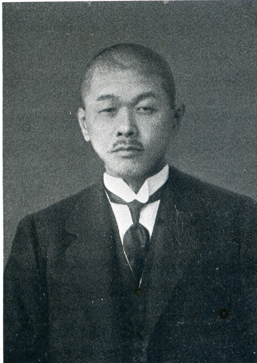 この写真は、井上知治（1886-1962）の写真です。